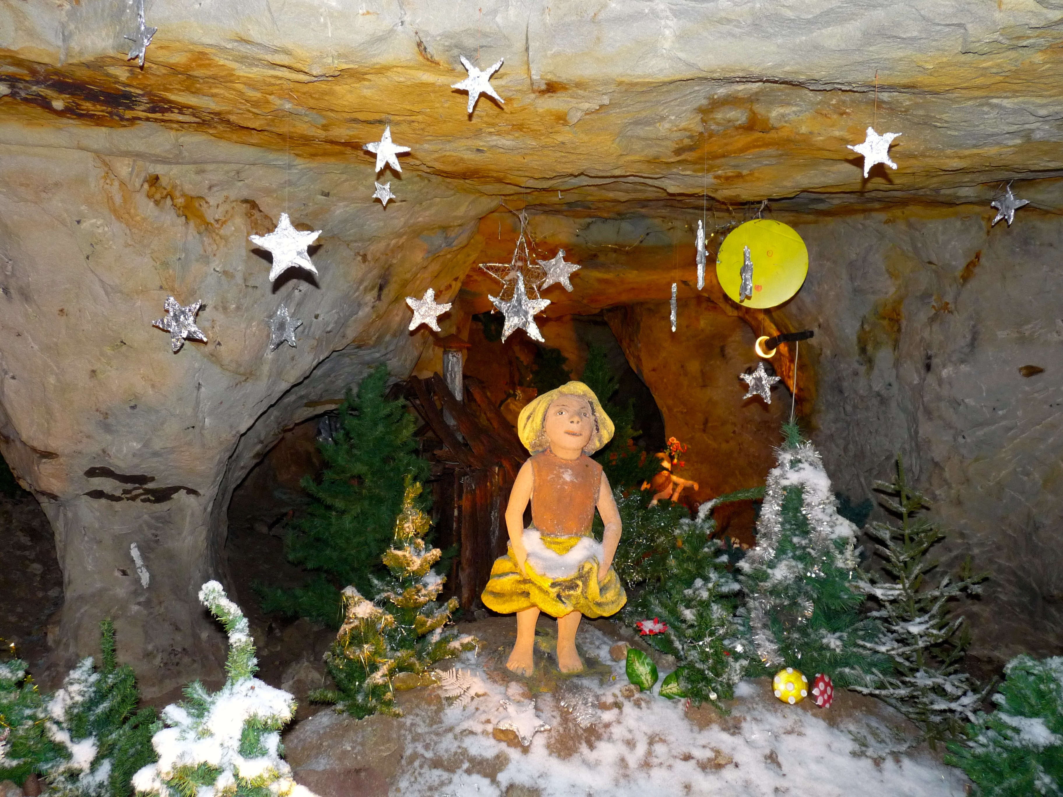 Die Sterntaler in der Märchenhöhle Walldorf.